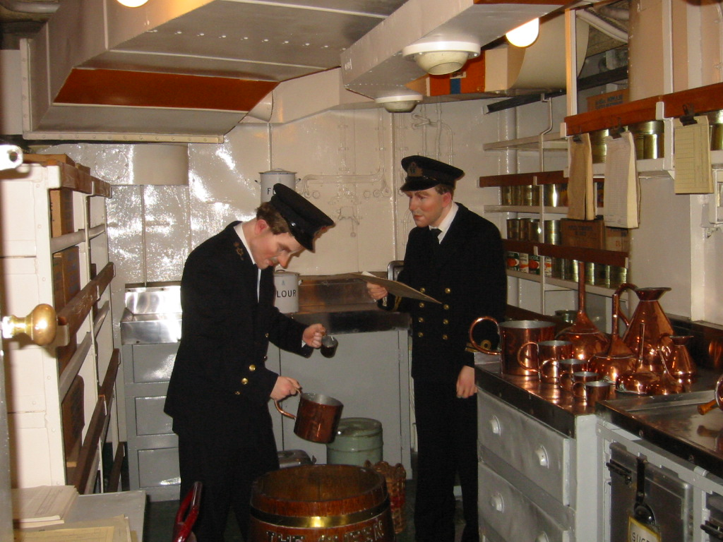 HMS Belfast, London